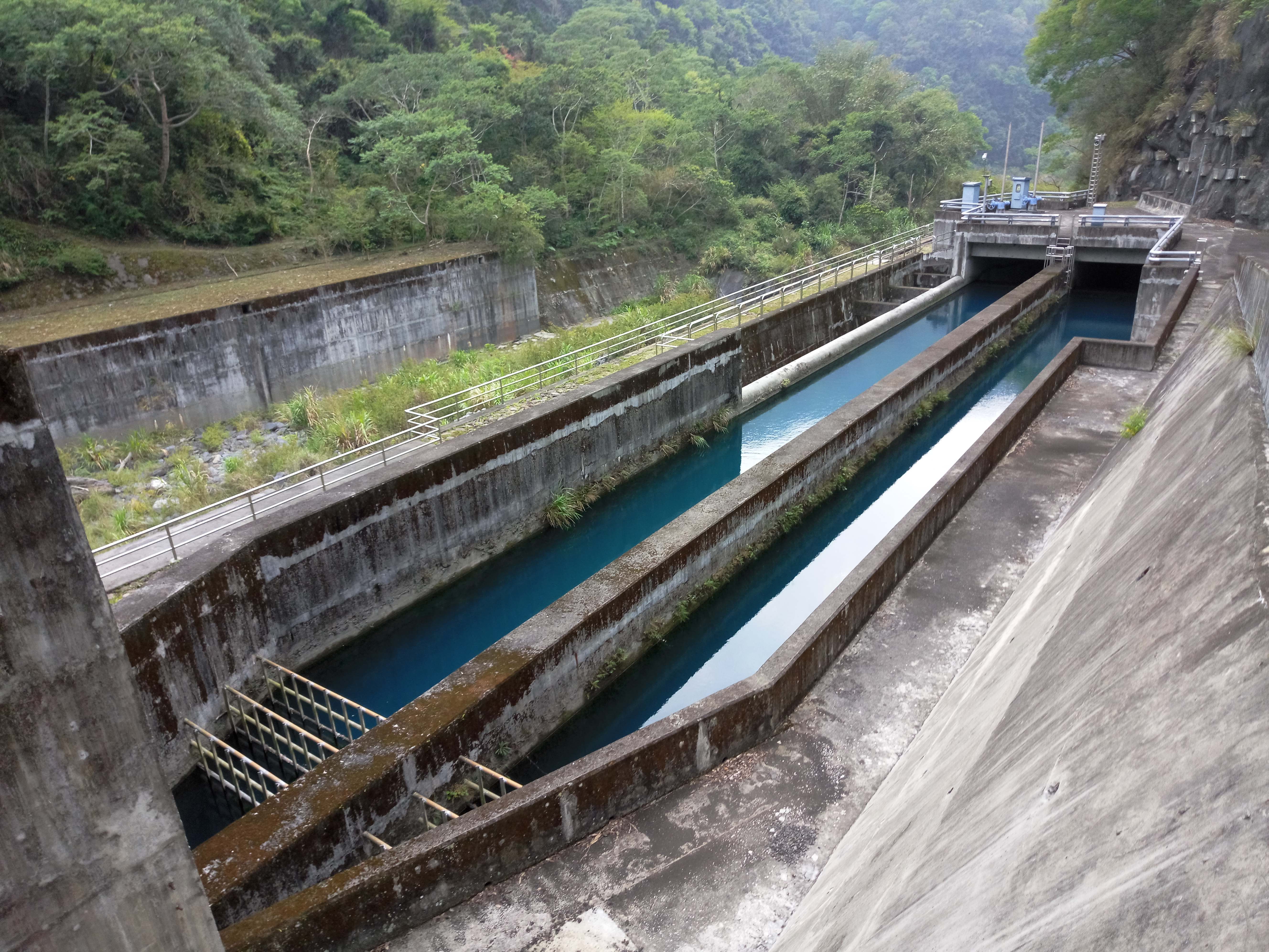 栗栖壩沉砂池，過後即為栗栖溪引水隧道